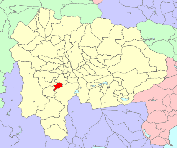 山梨県西八代郡六郷町の位置画像。